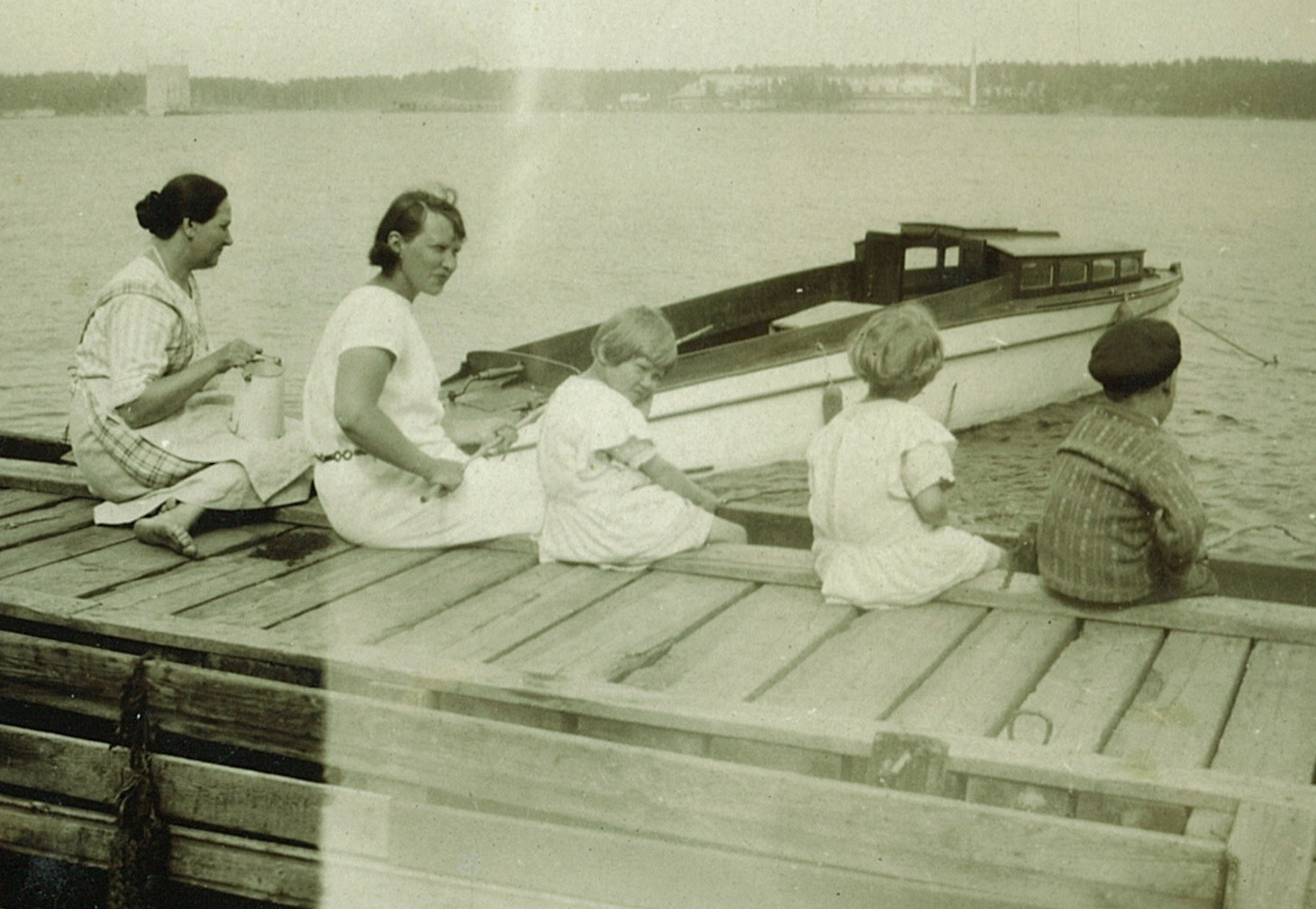 Hilkka Inkala keskellä kuvaa, Wäinö Jousen huvilalla Kotkan Musalossa kesällä 1930